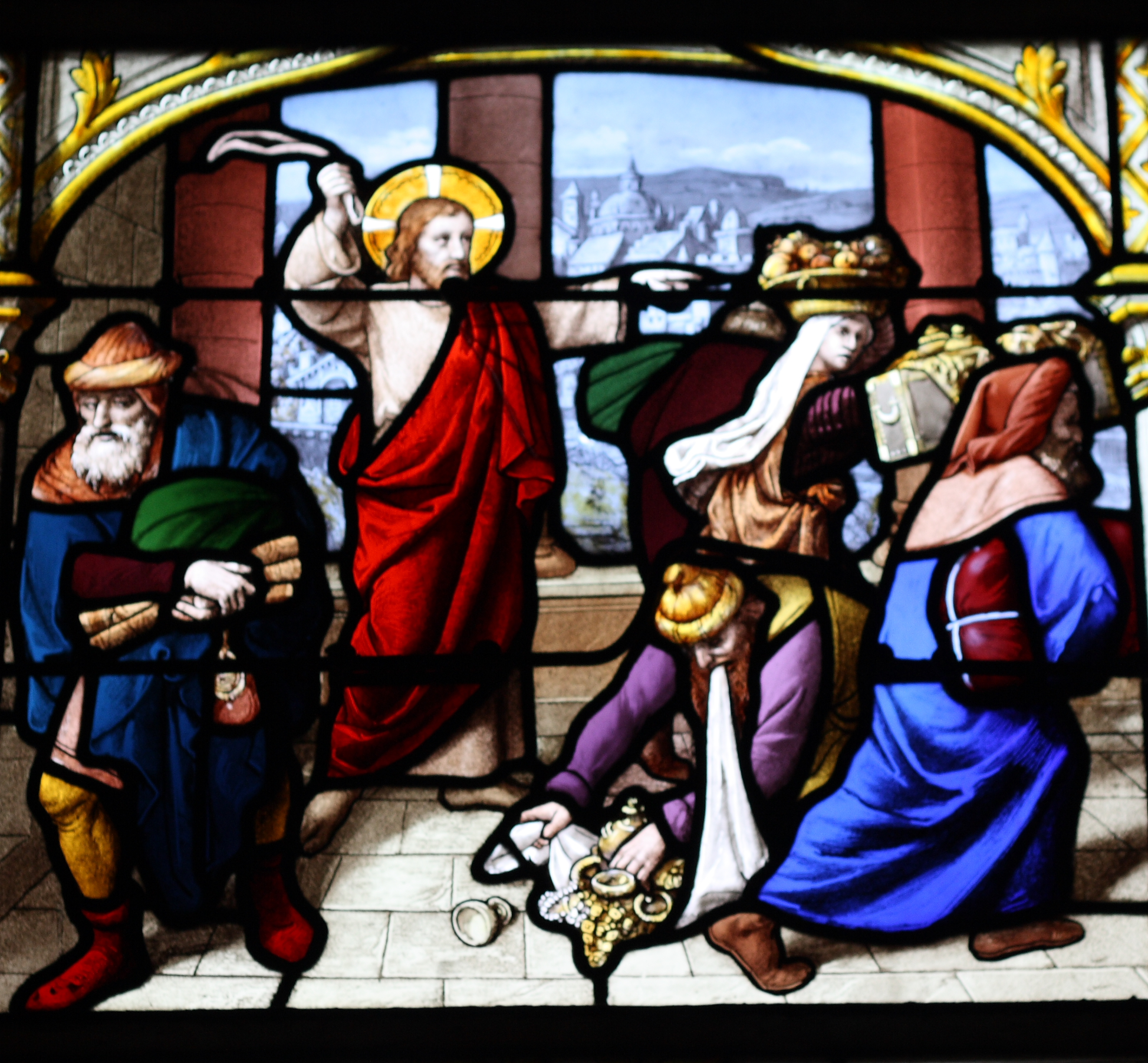 Bleiglasfenster (Ausschnitt) in der katholischen Pfarrkirche Église Saint-Aignan de Chartres in Chartres, Darstellung: Jesus verteibt die Händler aus dem Tempel